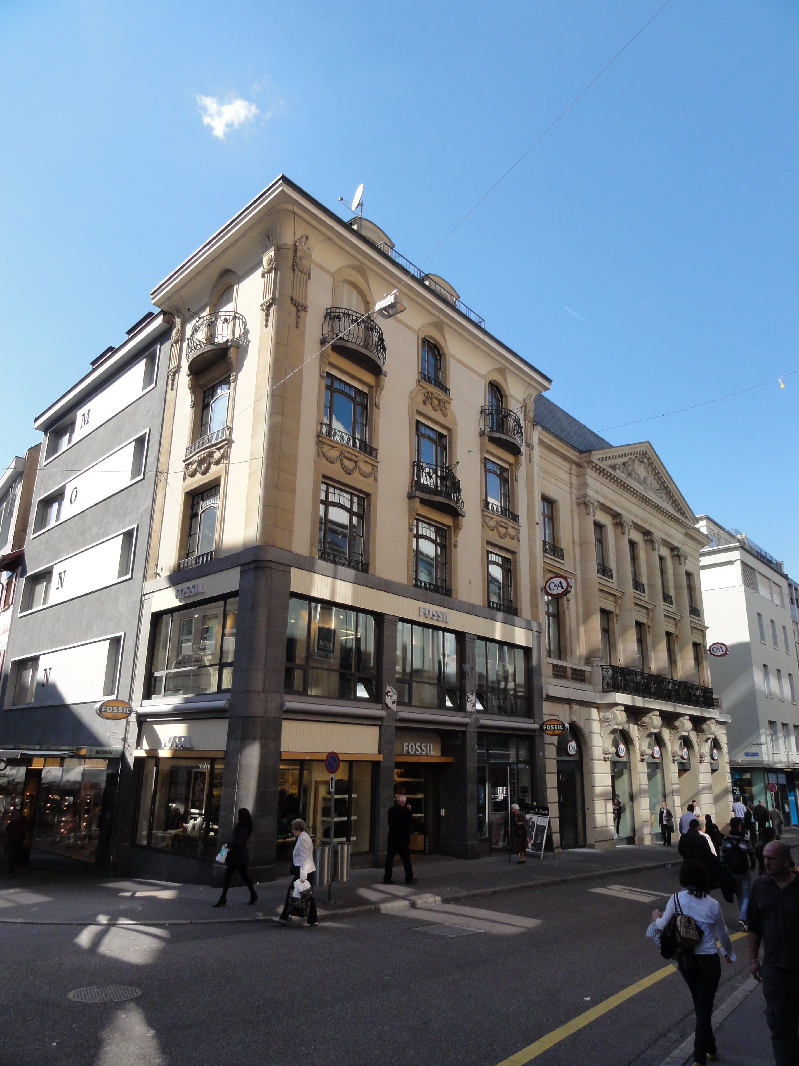 Basel — Freie Strasse 62 EXIF data with GPS coordinates and mag. north. GPS data in EXIF dataset is inaccurate.